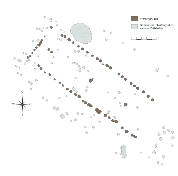 Urnenfelderzeitlicher Hausgrundriss aus Rannersdorf, archäologische Großgrabung 2001/2002.